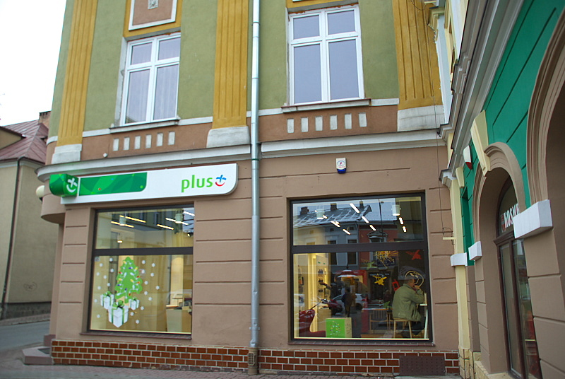 Oddział Plus Sanok ul. Grzegorza 4